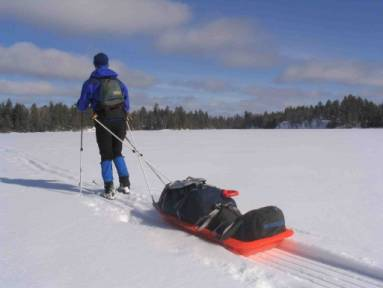 Ahkion vetämistä hiihtovaelluksella